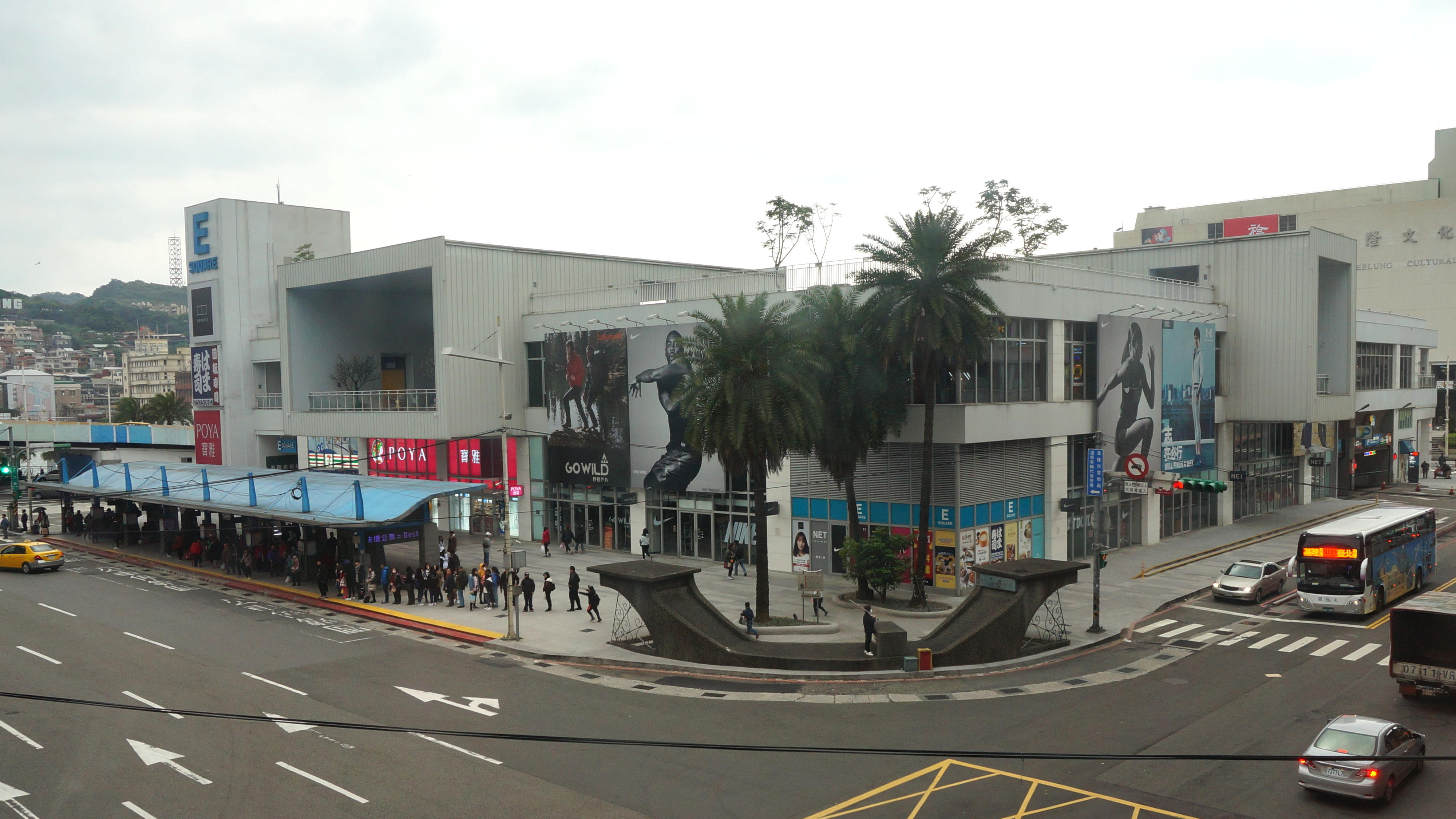 從臺灣麥當勞餐廳基隆愛三店三樓俯望基隆東岸廣場。